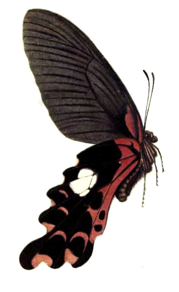 Papilio rhetenor = Papilio alcmenor C. & R.Felder, [1864]